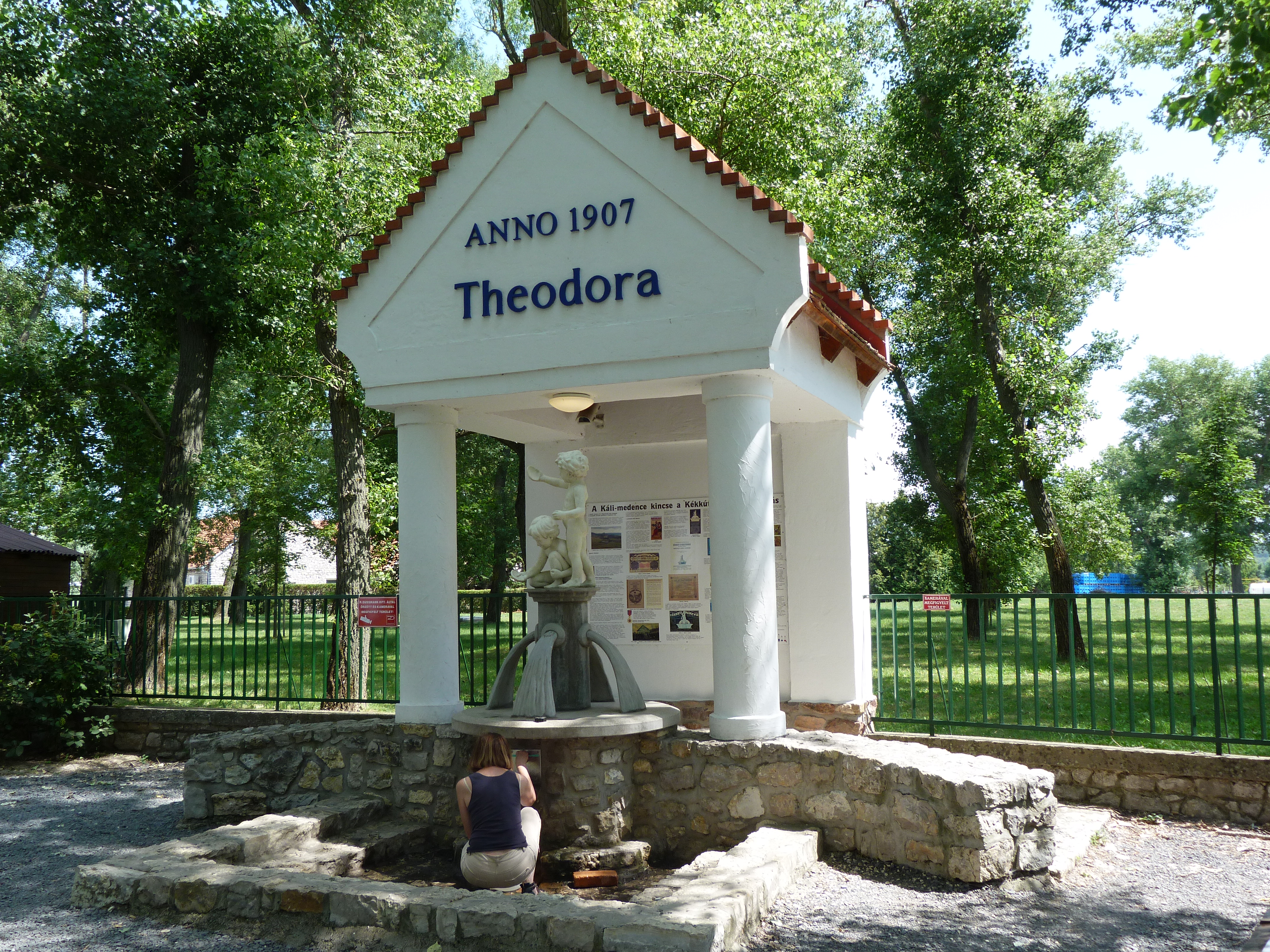 A felvételek 2014. július 6-én készültek Kékkúton, a Theodora forrásnál. Mérések szerint a kékkúti ásványvíz 13-000 – 16.000 éves. Megközelítése: Kékkútot Kővágóörs felé elhagyva, közvetlenül az út jobb oldalán forrásház és parkoló (3, 4). Hozama: közepes. A közelben indul a Theodora tanösvény a Ásványvíz Zrt. palackozóüzemétől, a Theodora Kereki forrástól (GPS: 46.8546795524, 17.5669915335), majd a Sásdi patak mentén a Kornyi-tó irányában halad. Forrás: Dr. Dobor Irma Kétezer év a Kékkúti ásványvíz életében Nemzeti Park Magyar Ásványvizek Cimkék: Kékkút Theodora Forrás Kékkúti Ásványvíz Zrt.